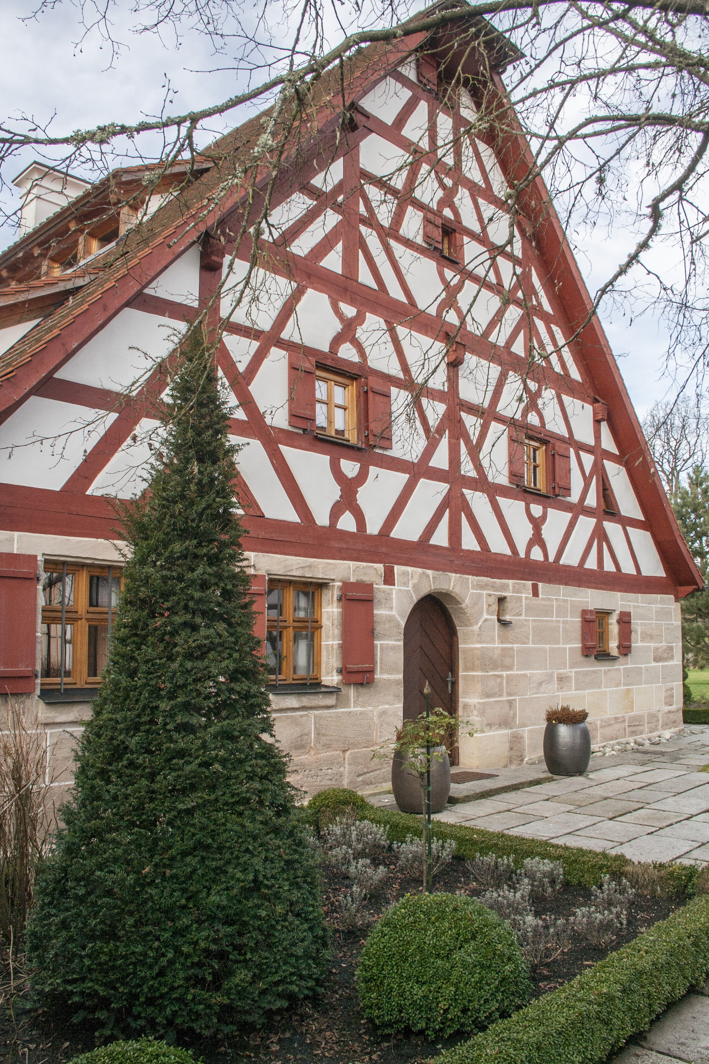 Wohnhaus, Oberhembach